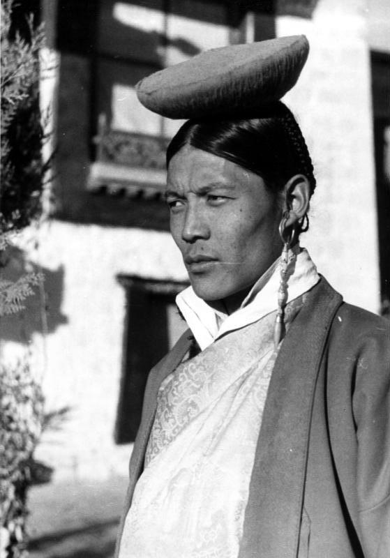 Lhasa, der Tarinprinz